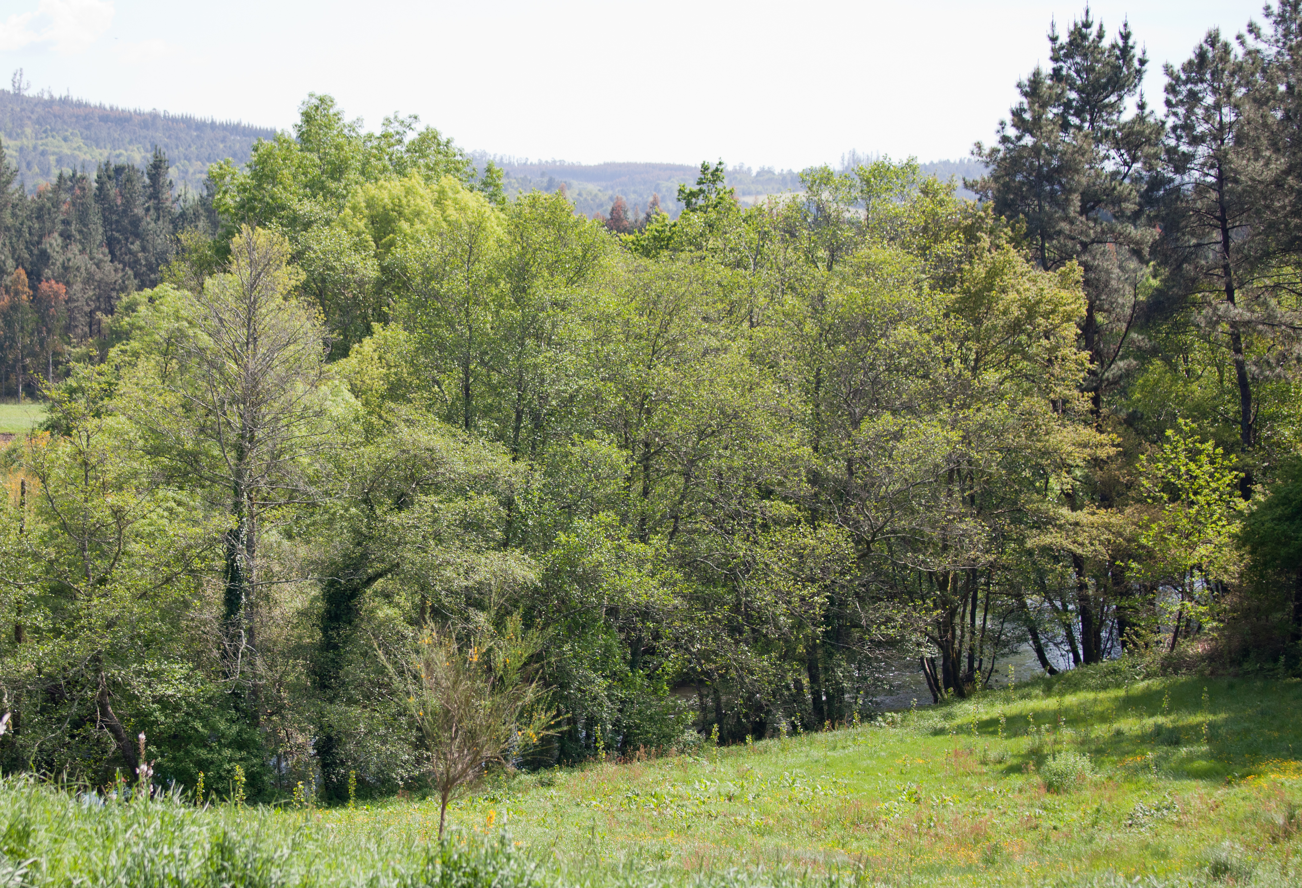 Río Tambre en Vilarromarís, Oroso